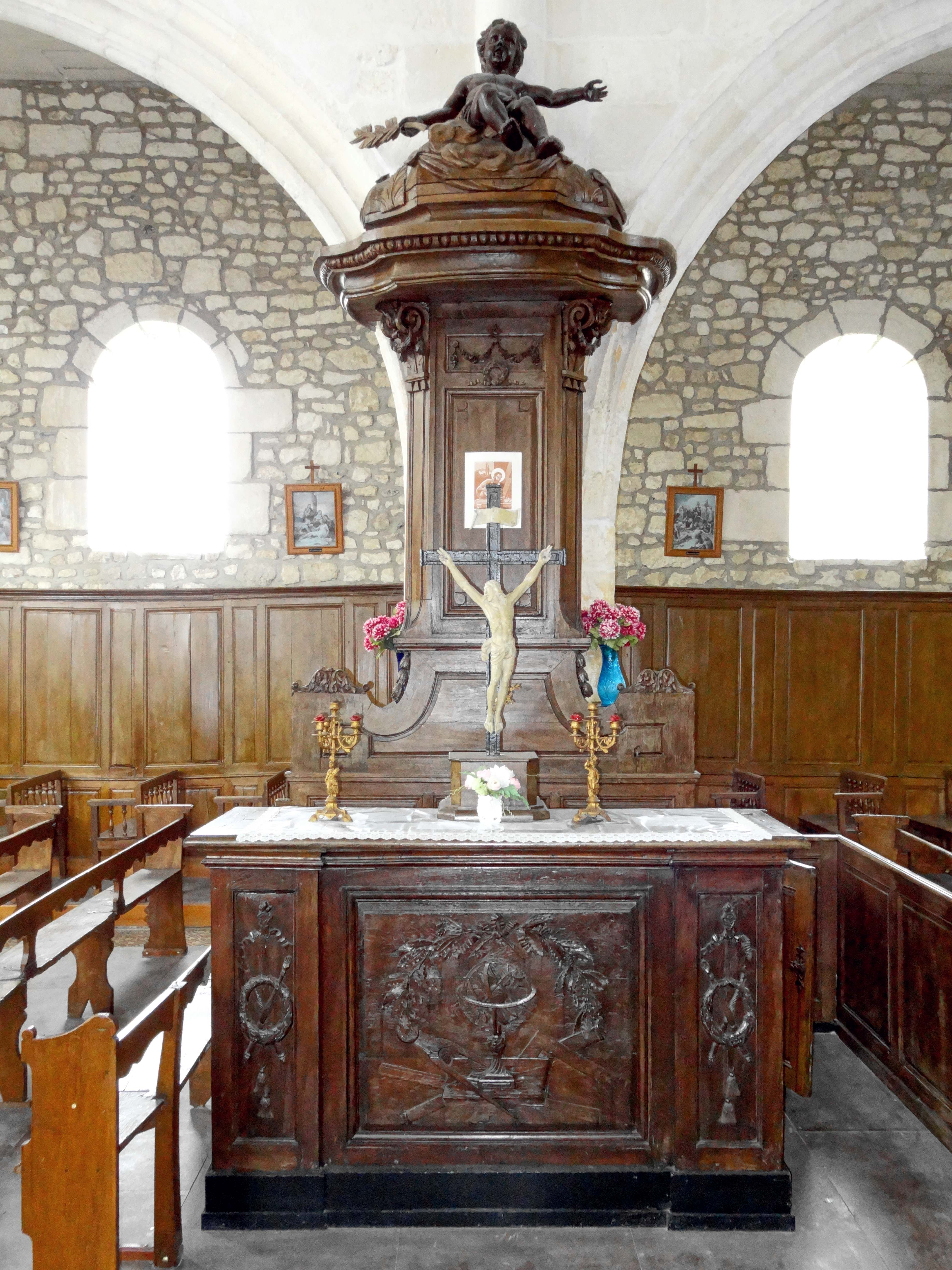 Mobilier de l'église - voir titre.